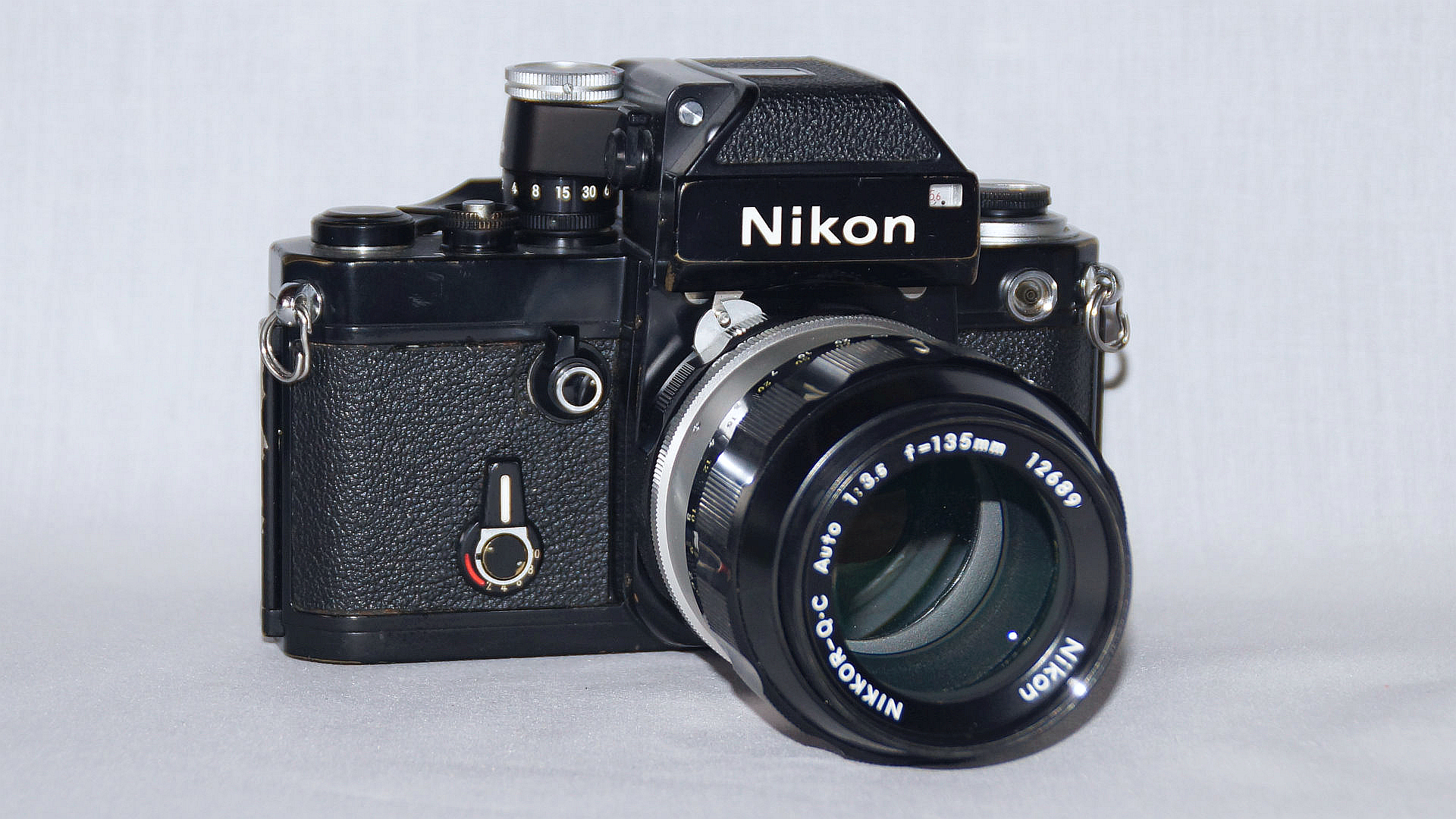 Nikon F2 Photomic black mit Nikkor Q-C 1:3.5/135mm, Foto Wolfgang Pehlemann DSC04855